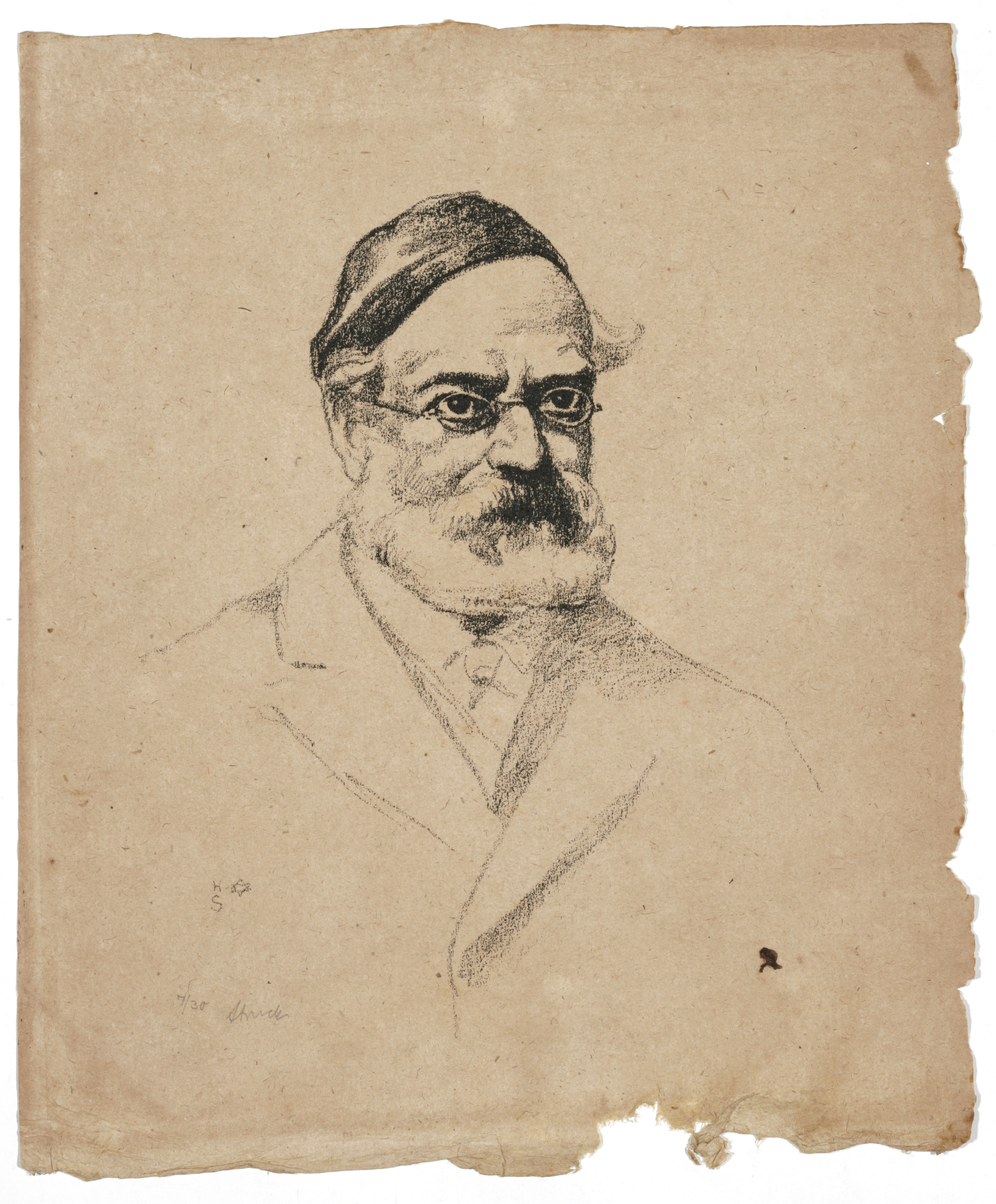 Artwork by Hermann Struck Dargestellte Person: Hirsch, Samson Raphael (1808 - 1888), DNB-Link Datierung Display: ca. 1900 - 1940 Objektart: Lithografie Schlagworte Inhalt /Geografie: Mann, Porträt, Brille, Kleidung, Kopfbedeckung Schlagworte Kontext: Neo-orthodoxes Judentum, Rabbiner, Schriftsteller